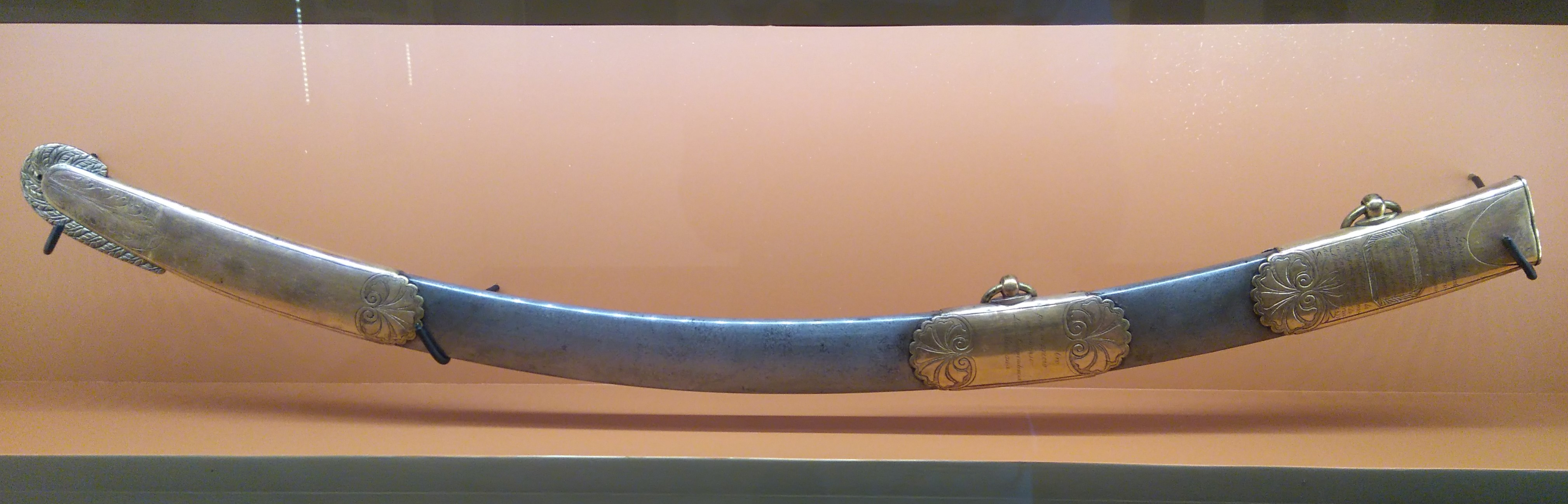 Sable que usó Agustín de Iturbide en su entrada Triunfal en la Ciudad de México el 27 de septiembre de 1821